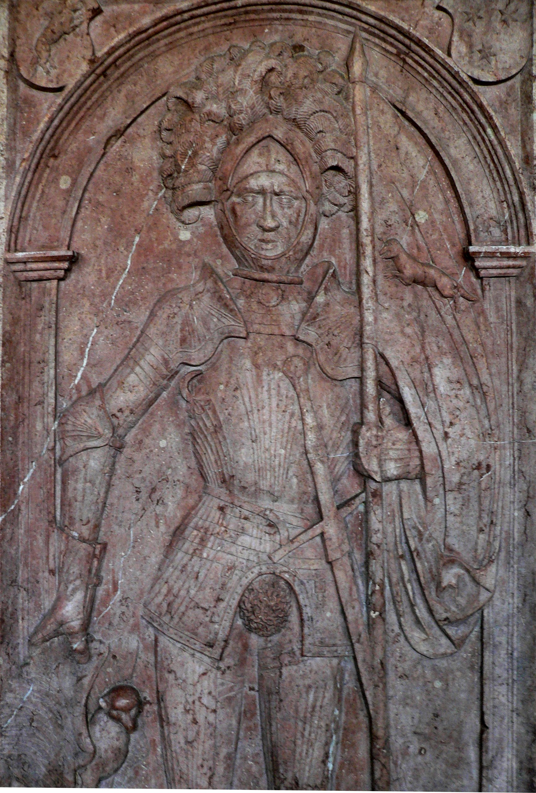 Epitaph an der Kirchenwand der Pfarrkirche Schamhaupten